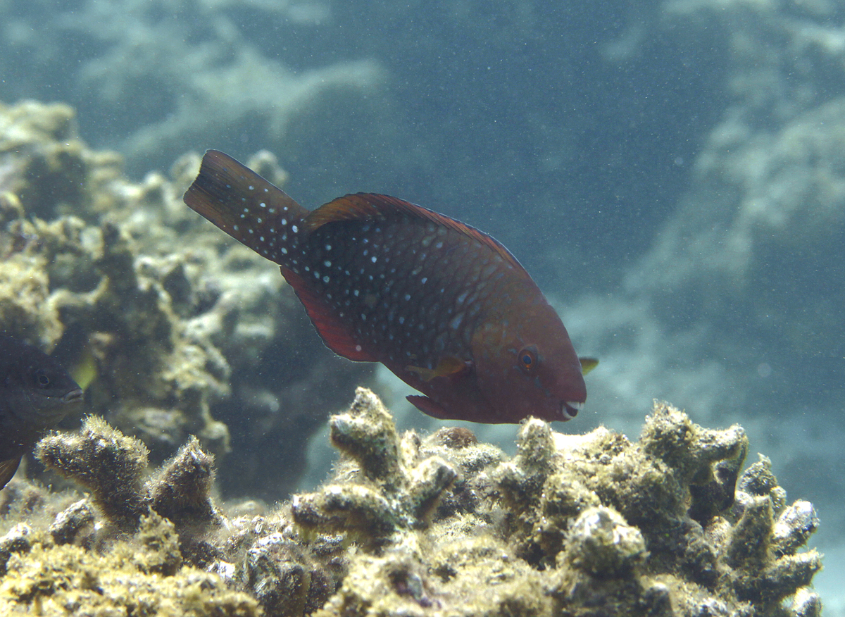 Un poisson perroquet Scarus falcipinnis en phase initiale à la Réunion.